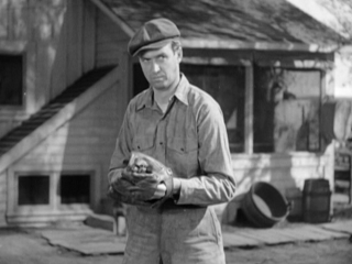 1949年製作の映画『甦る熱球』の予告編動画より